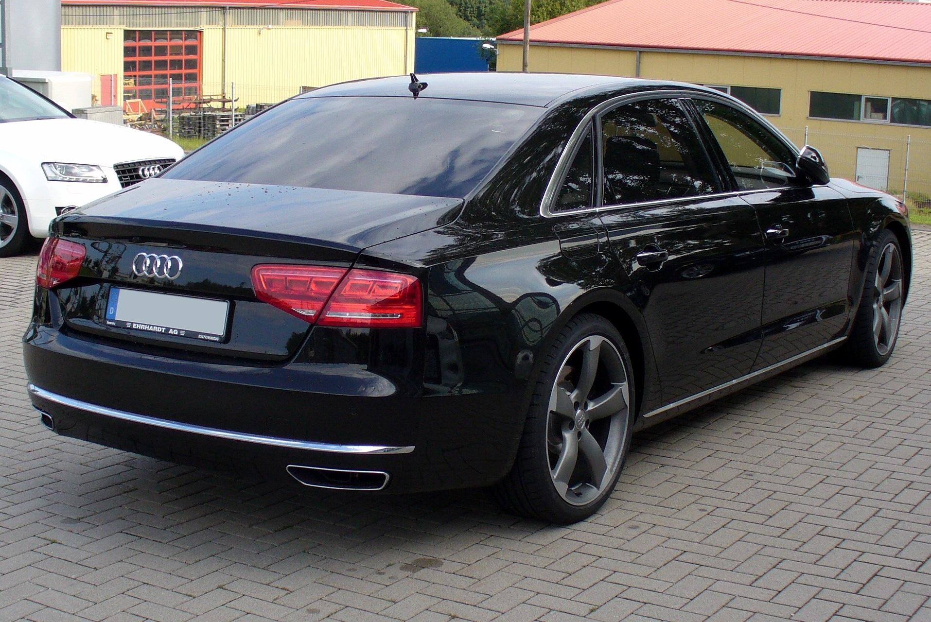 Audi A8 W12